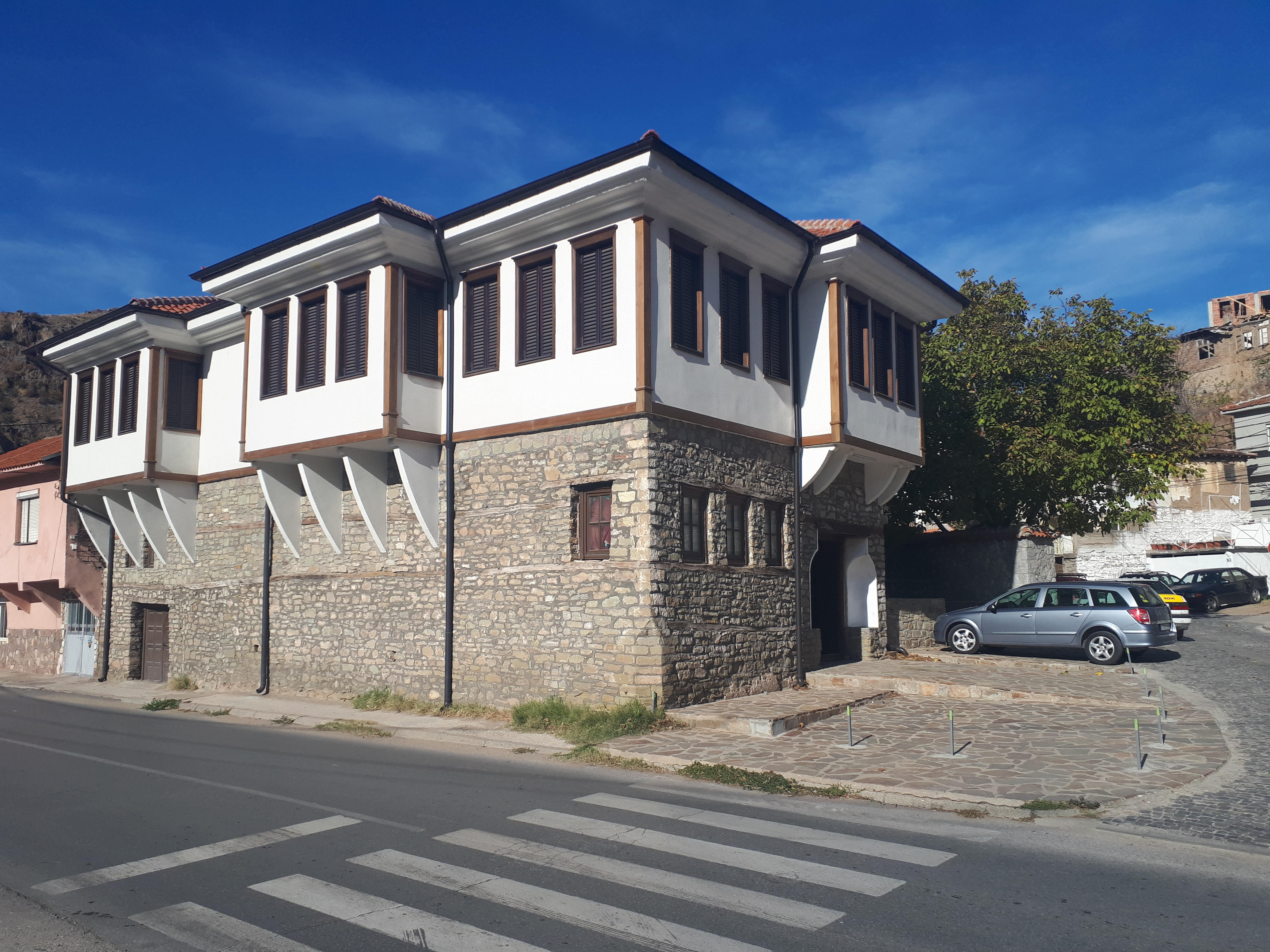 Музеј на ВМРО и дејците од Штипско во Ново Село по реновирањето.